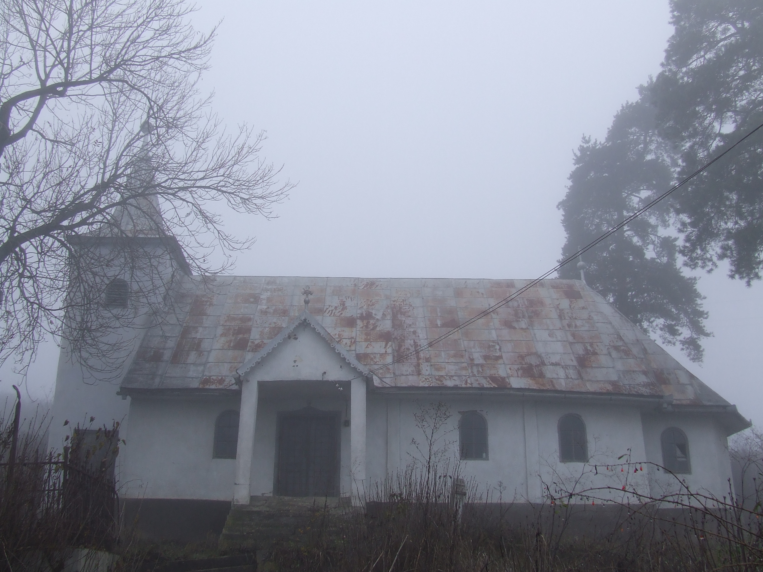 Biserica de lemn cu hramul Sfântul Nicolae din Miheşu de Câmpie, judeţul Mureş.